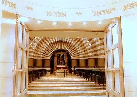 Синагогу "Золота Роза" у Дніпропетровськ